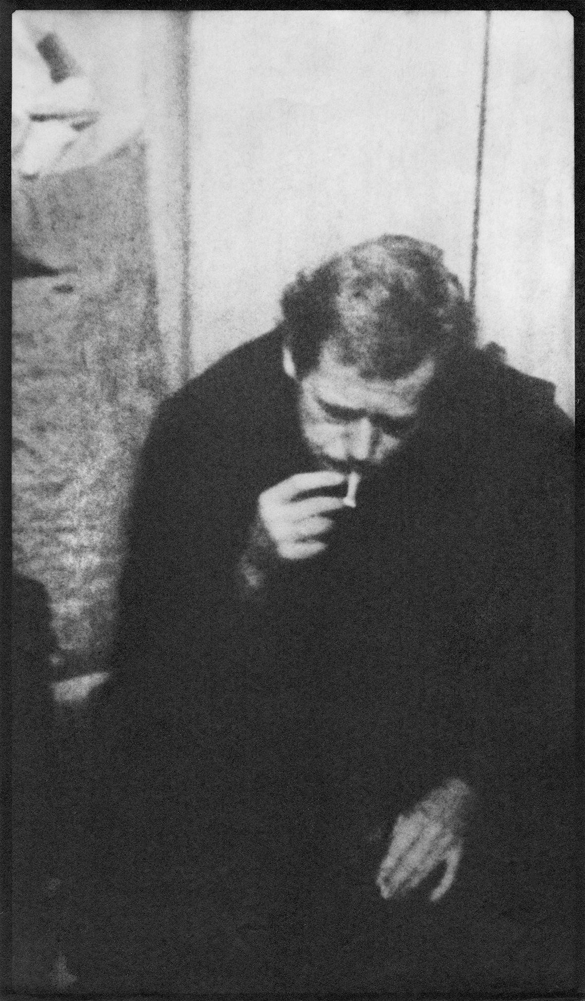 Václav Havel